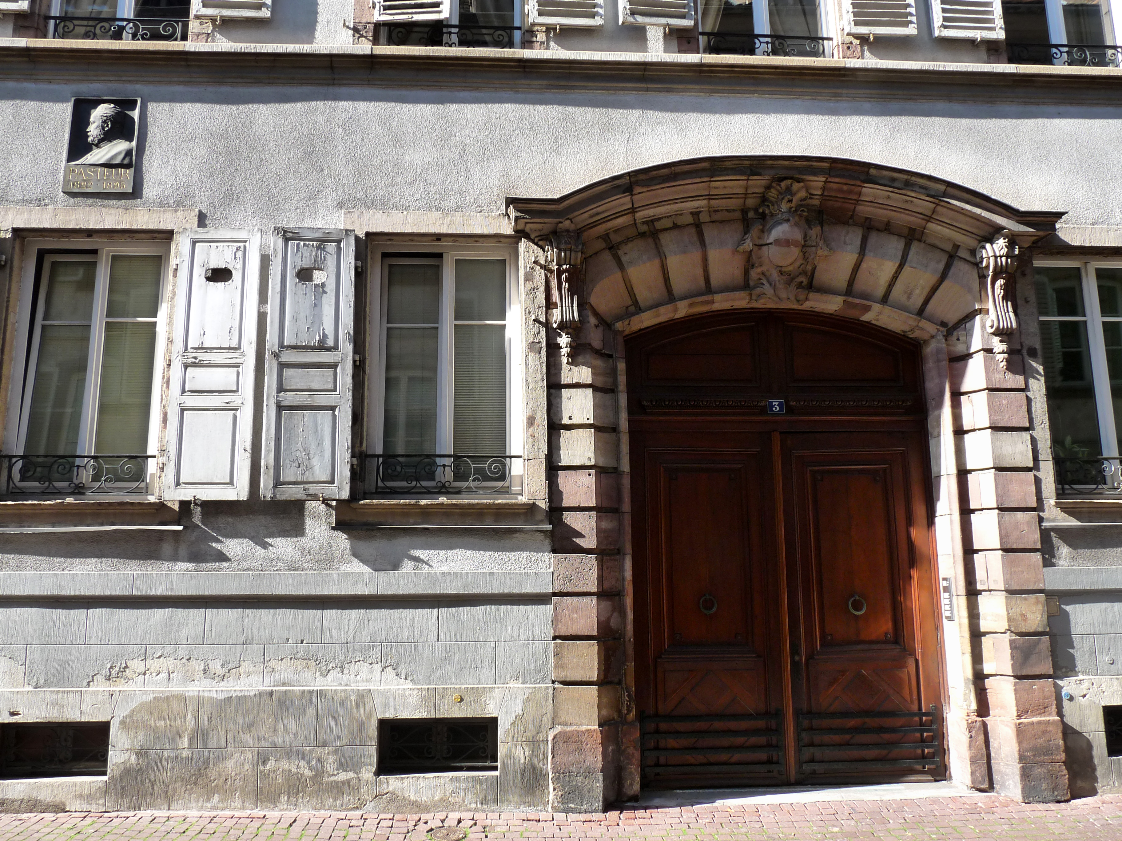 Portrait de Louis Pasteur réalisé par le graveur Henri Auguste Jules Patey (1855-1930) pour une plaque en bronze apposée à Strasbourg, au 3, rue des Veaux, une maison dans laquelle il vécut quelques années.